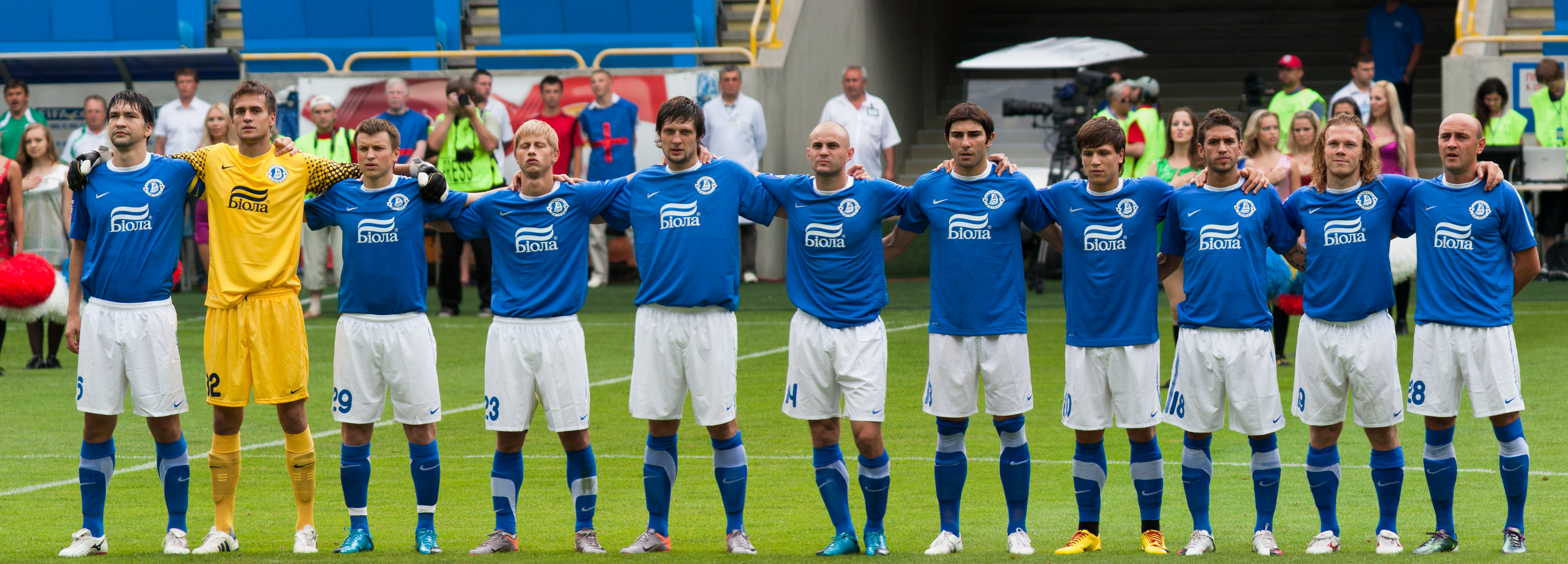 "Днепр" Днепропетровск перед матчем с "Карпаты" Львов